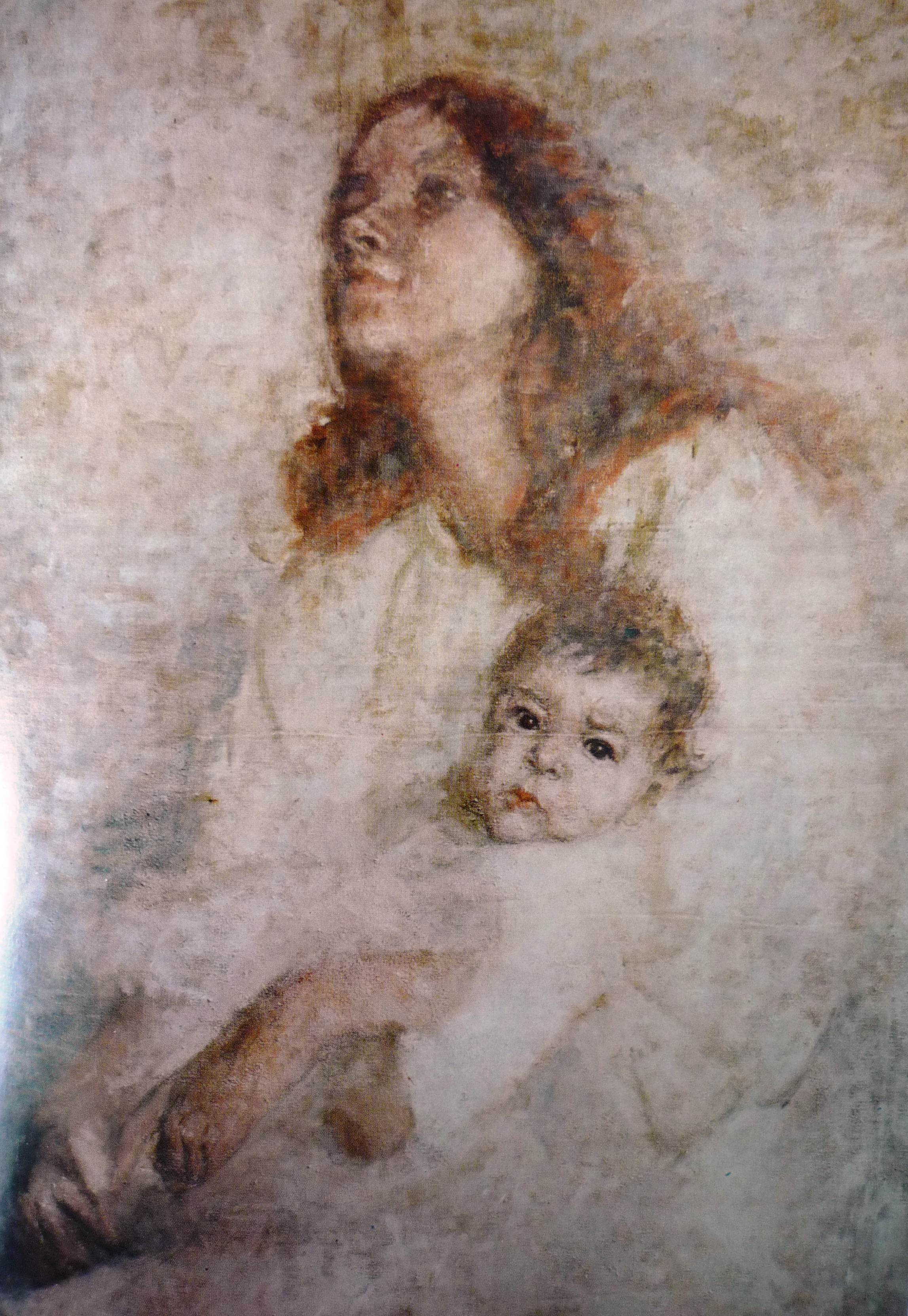 Vladimír Suchý obraz